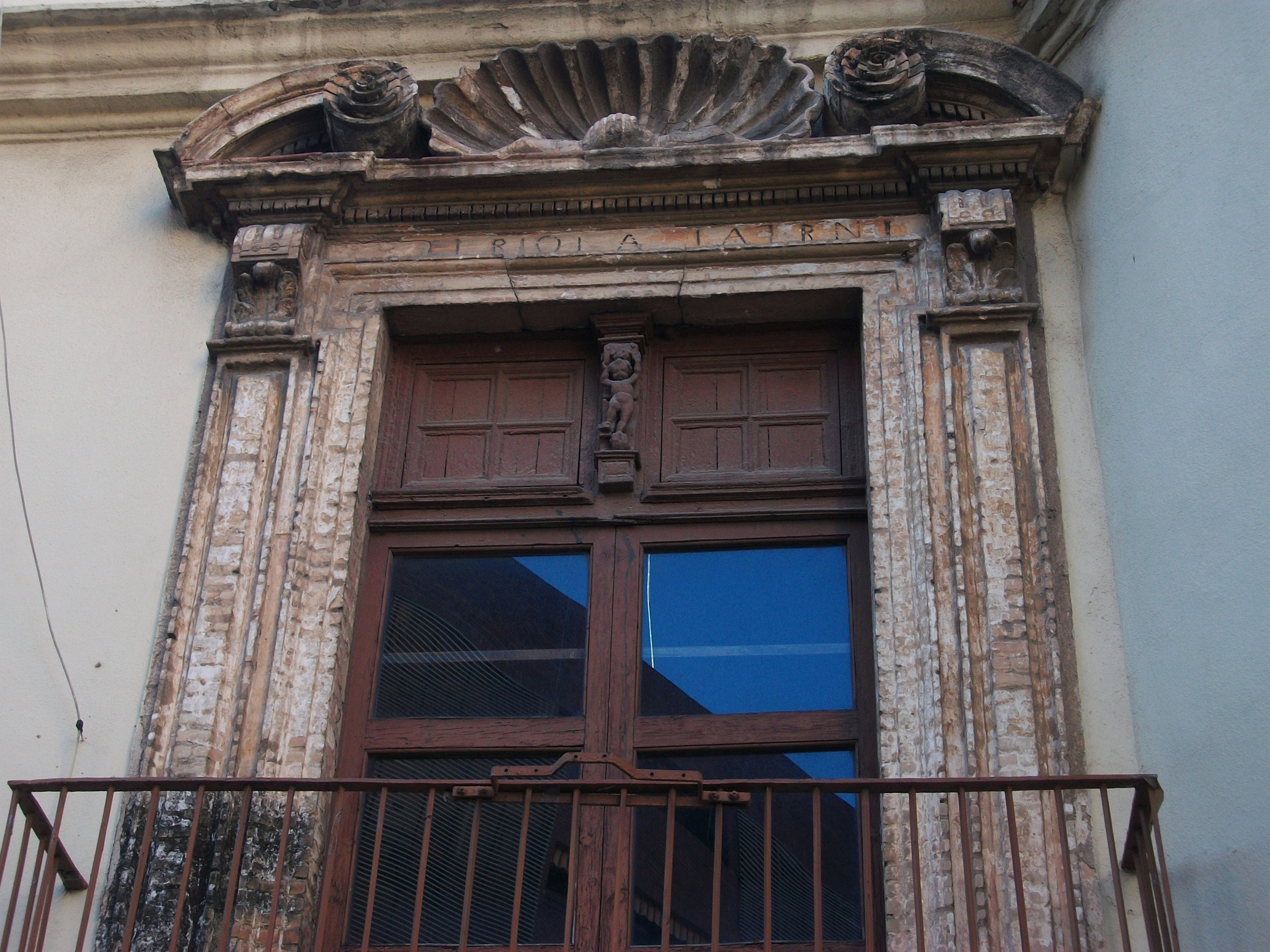 Detall de la finestra del balcó de l'alqueria de Julià, València.